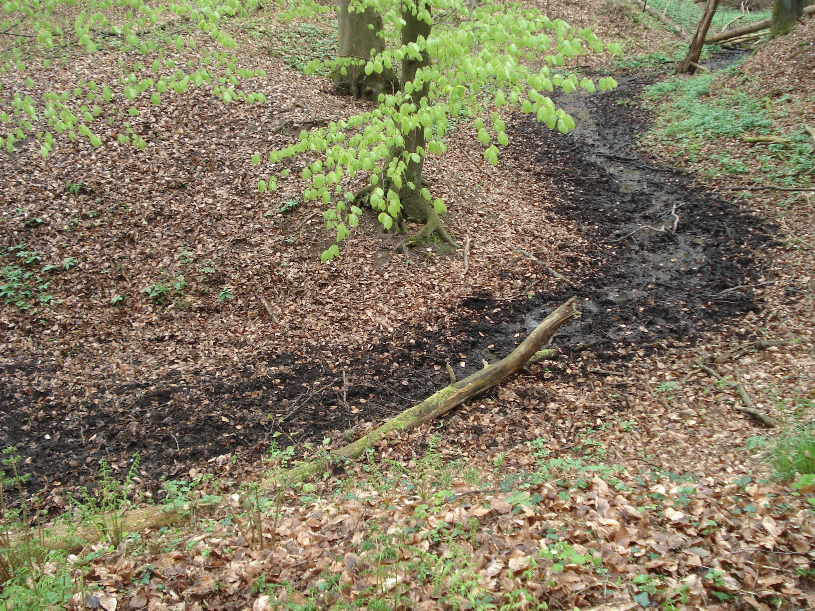 Die Versickerung des Plattengrabens